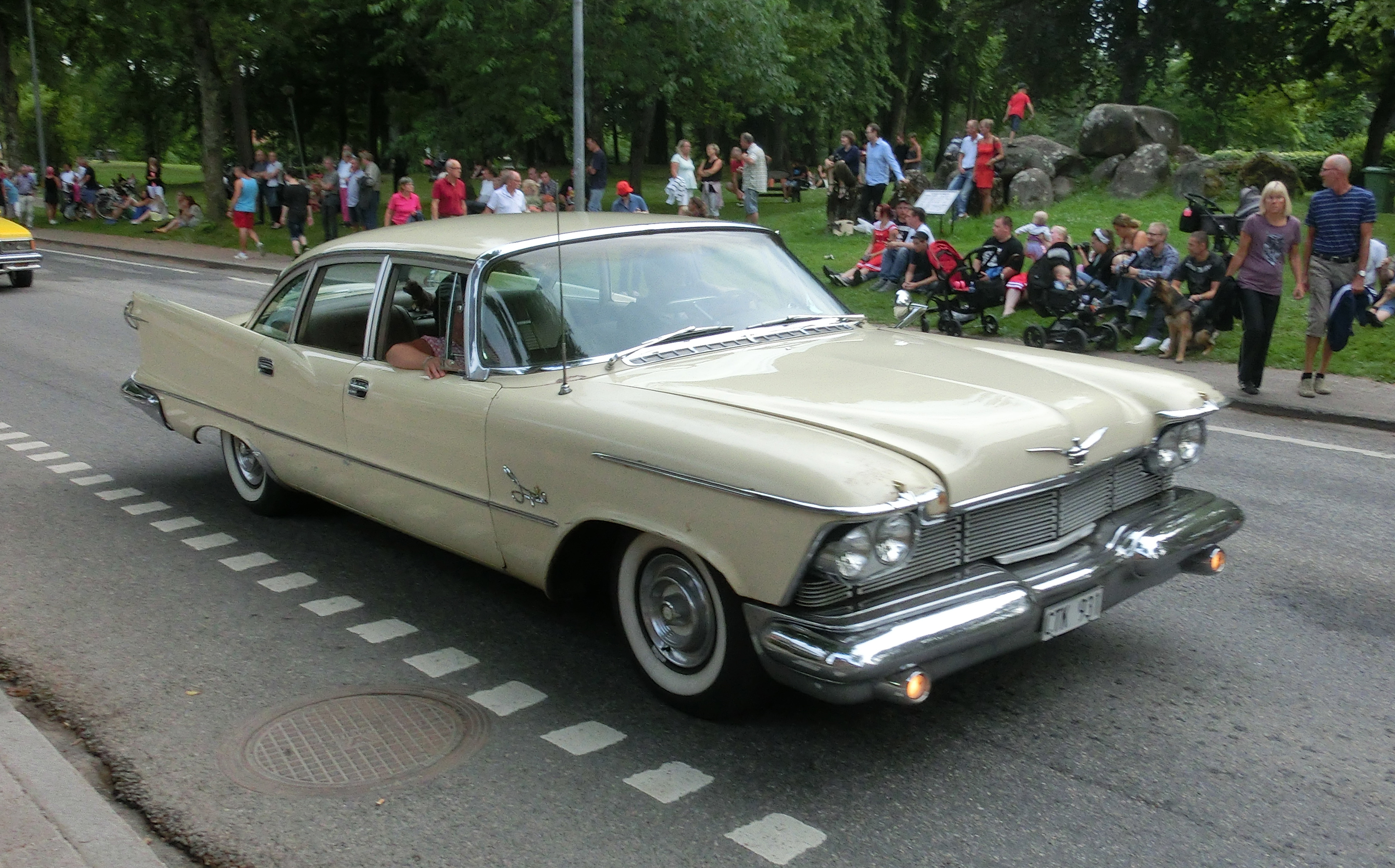 En Imperial 1958 på cruising på Ströget (Sankt Olofsgatan) i Falköping 2013-07-27.